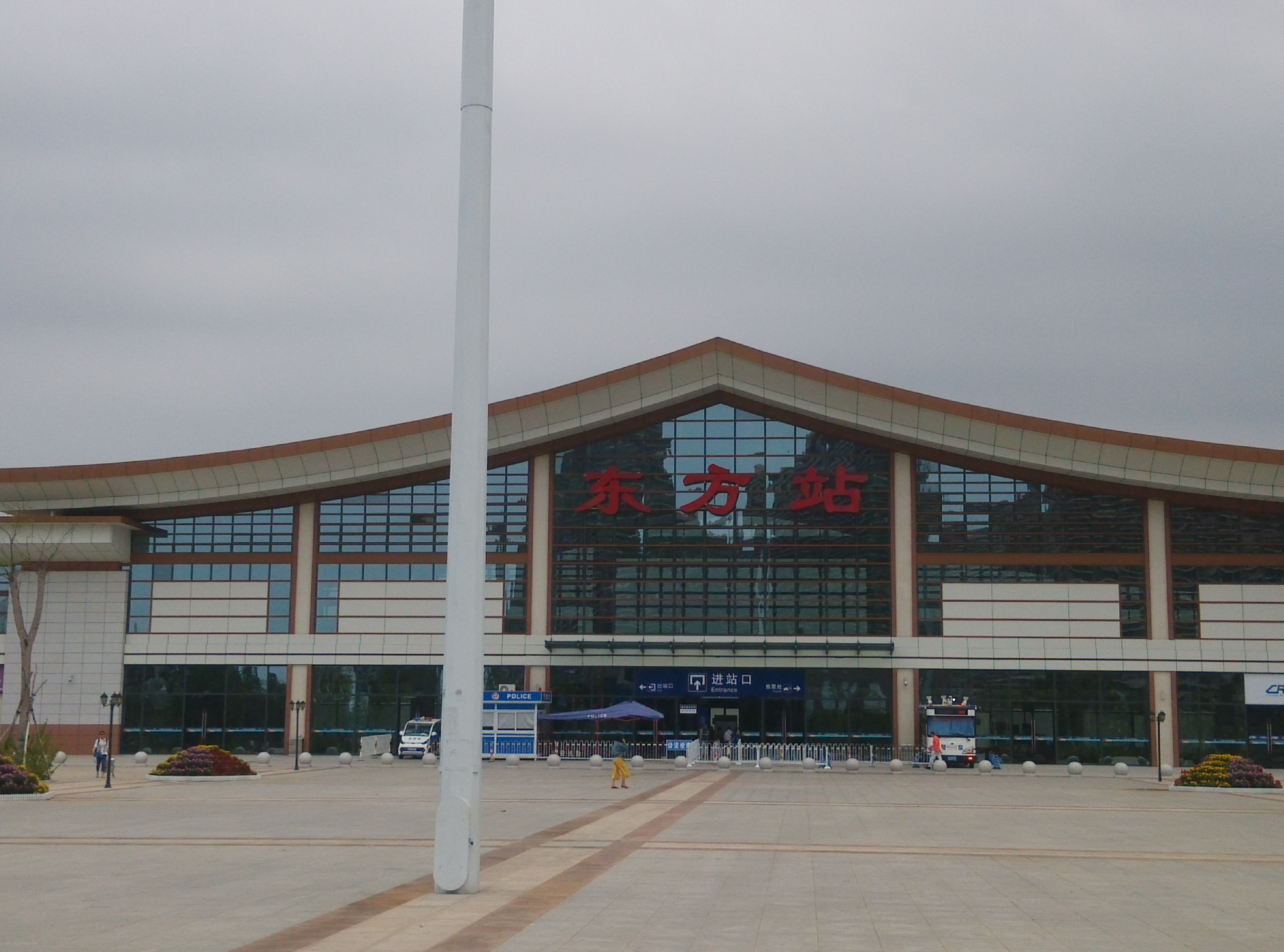 海南西環高鉄東方駅駅舎。